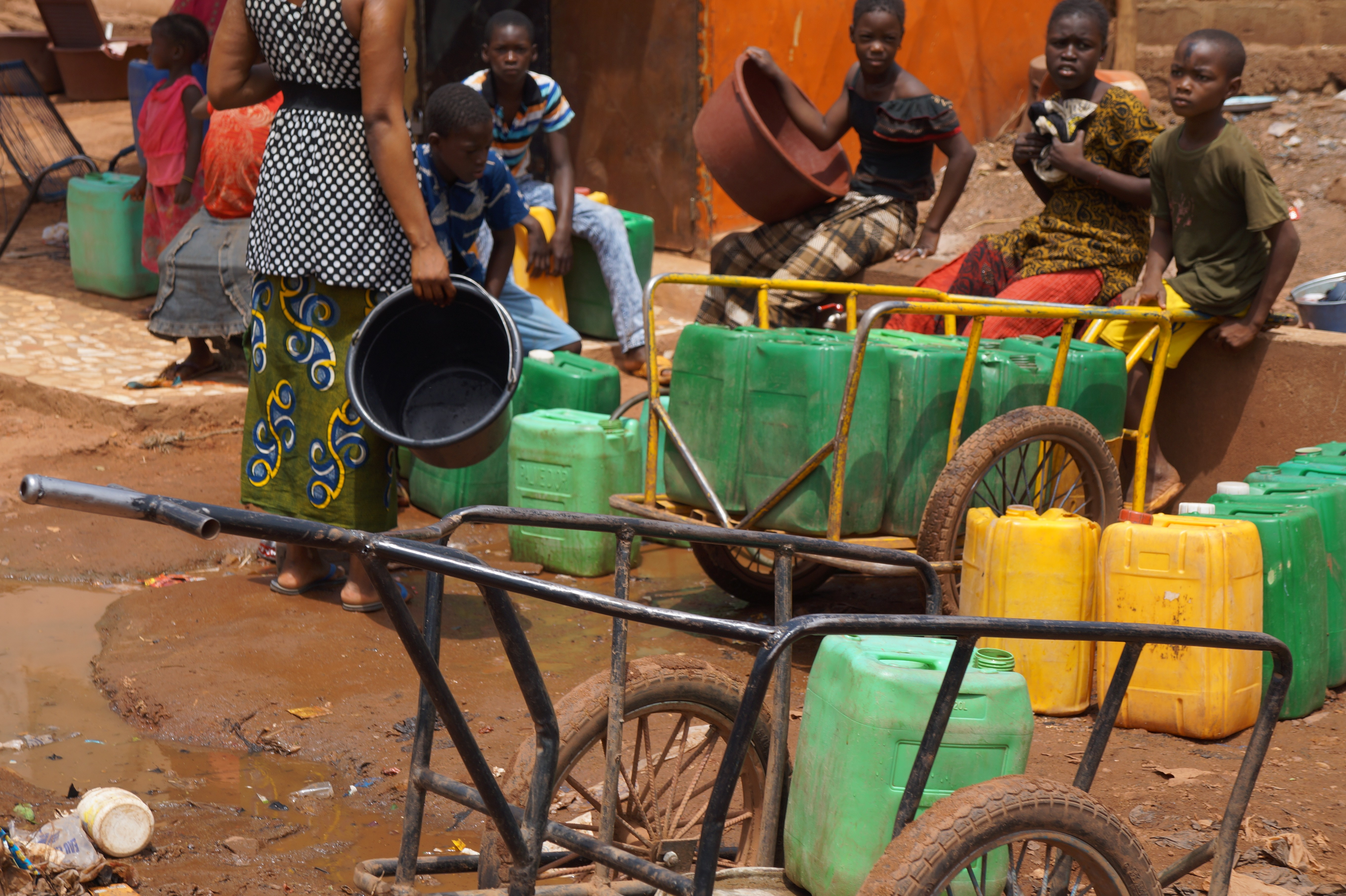 Même en ville, tout le monde n'a pas l'eau courante et on doit se ravitailler pour les besoins quotidiens This is an image of "African people at work" from Mali